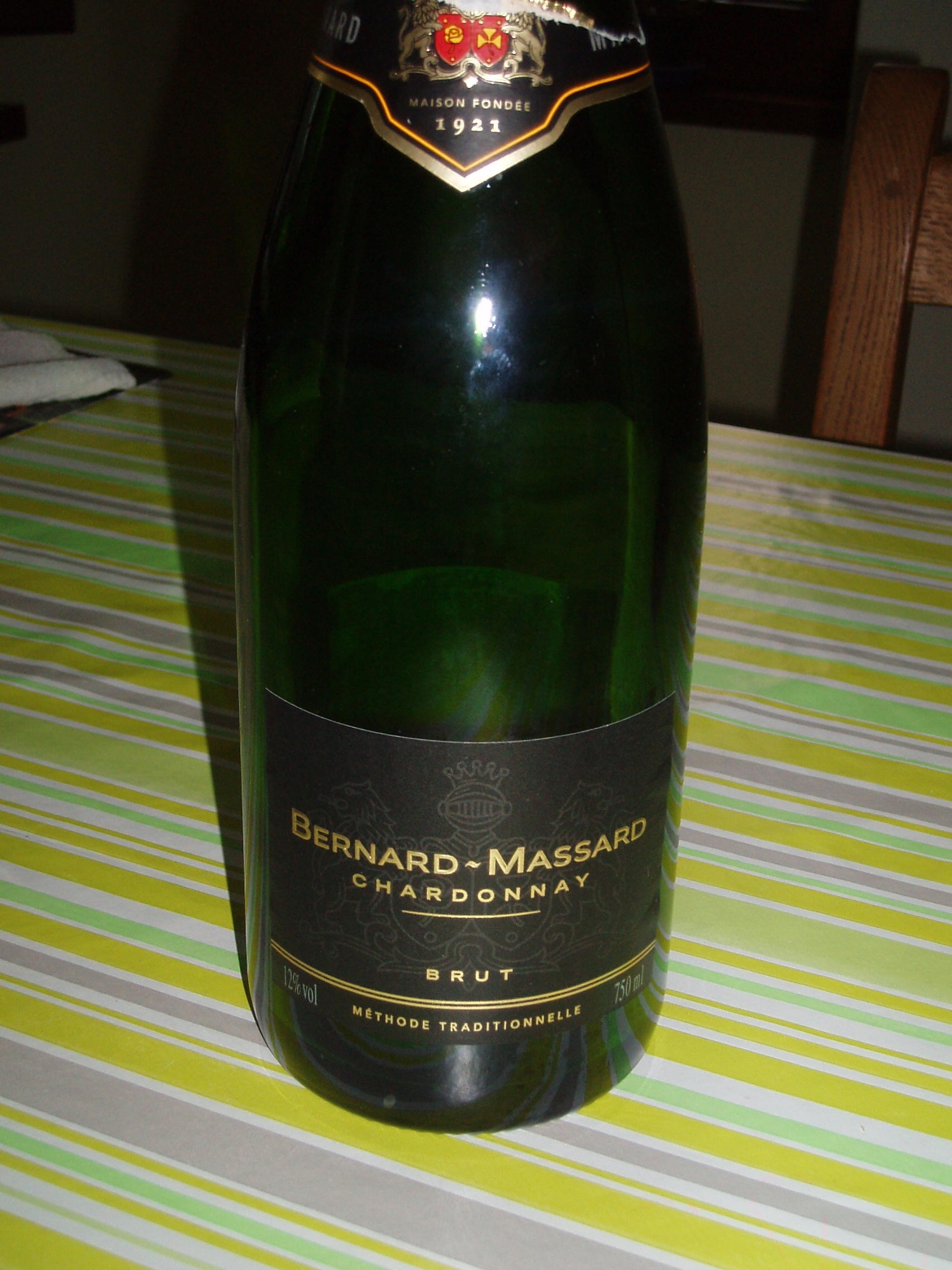 Bernard-Massard Chardonnay Brut